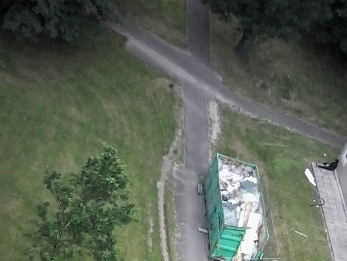 Drogué inconnu avachi au pied d'un immeuble, non reconnaissable. France.